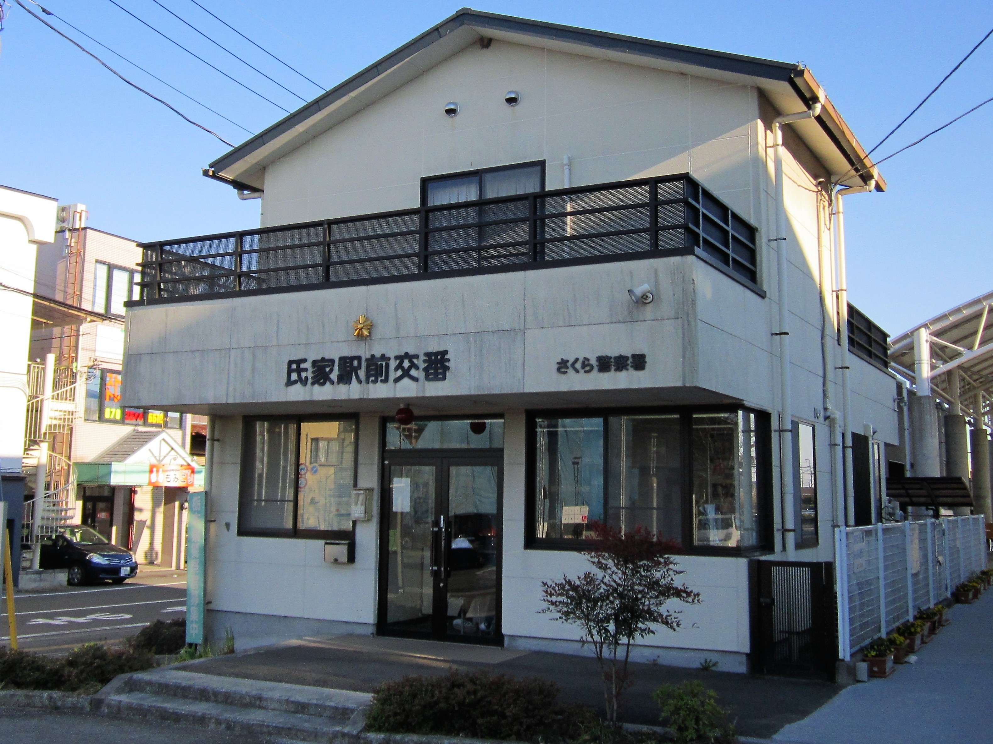 さくら警察署 氏家駅前交番（さくら市氏家） Canon PowerShot A2200